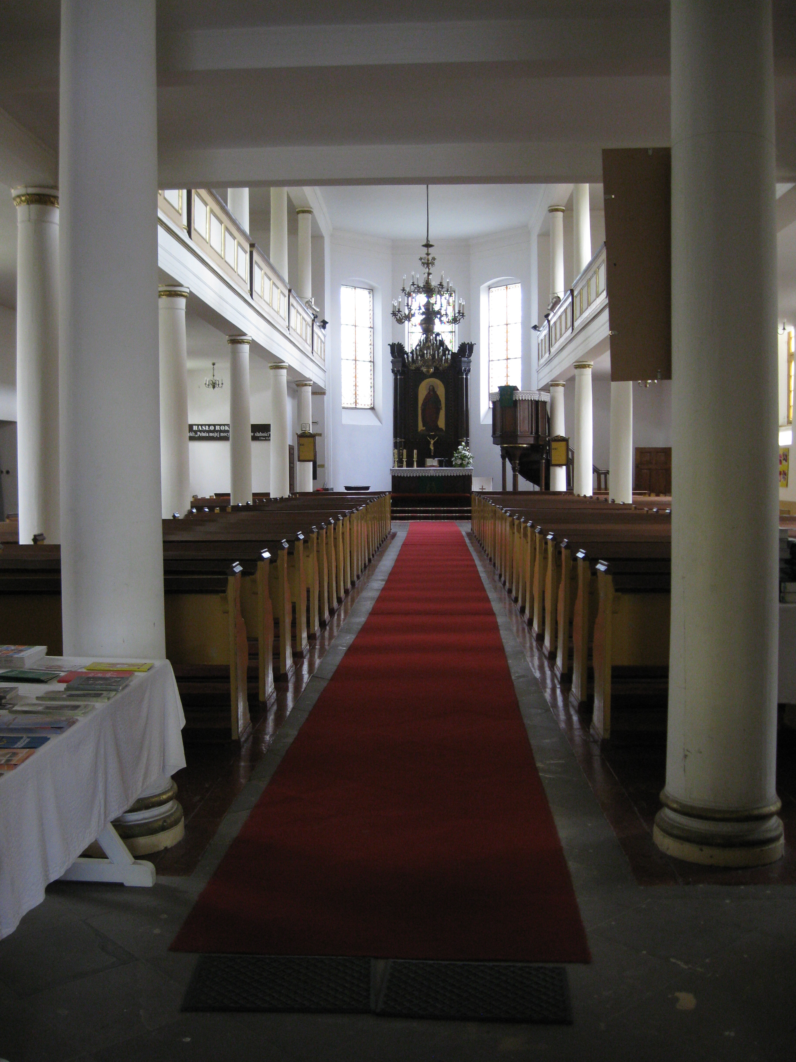 Giżycko - zespół kościoła ewangelickiego: kościół (zabytek nr A-3244 i 1827 z 18.12.1991)